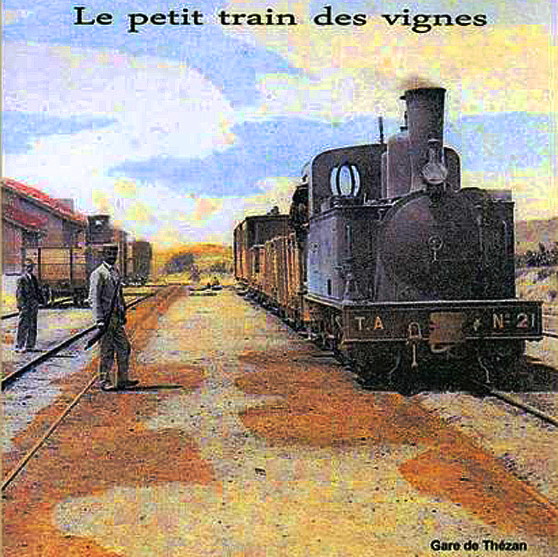 Le petit train des vignes à Thézan